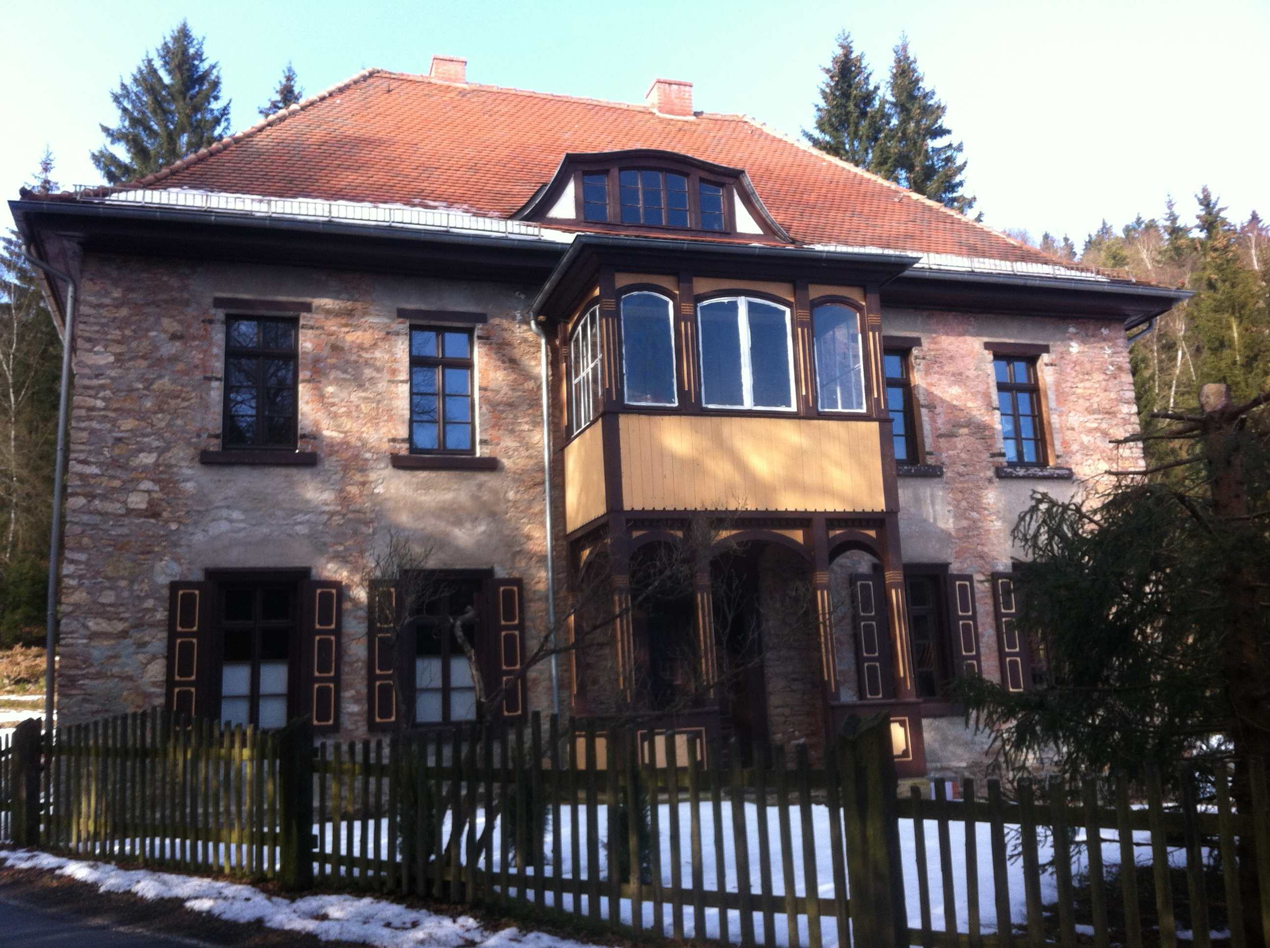 Haus Hüttenplatz 1 in Silberütte